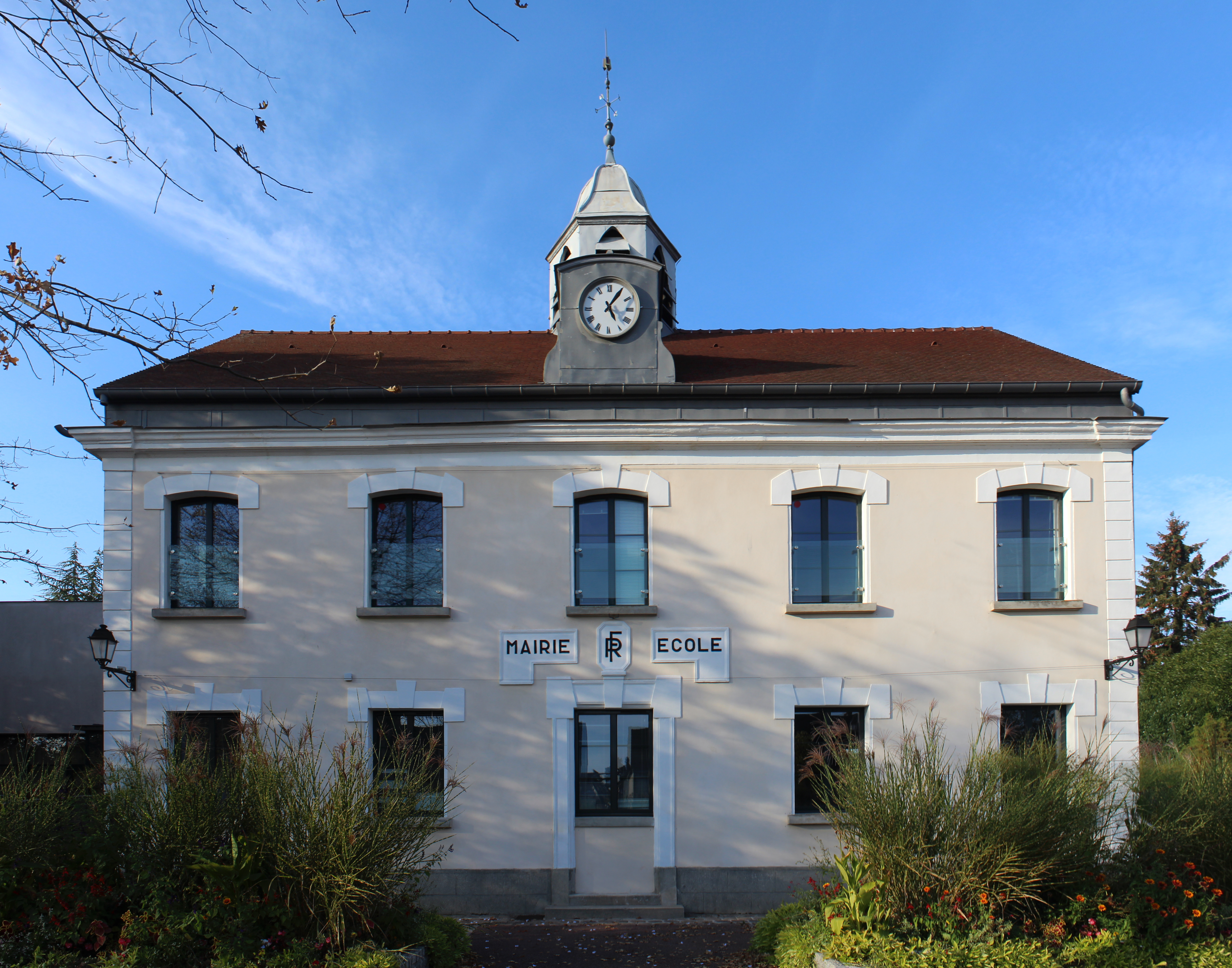 Mairie de Bailly-Romainvilliers.